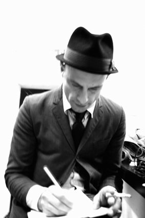 Aaron Rose, Selbstporträt